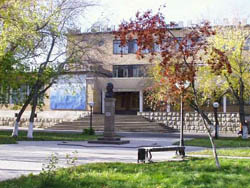 Северо-Казахстанская областная универсальная научная библиотека им. Сабита Муканова